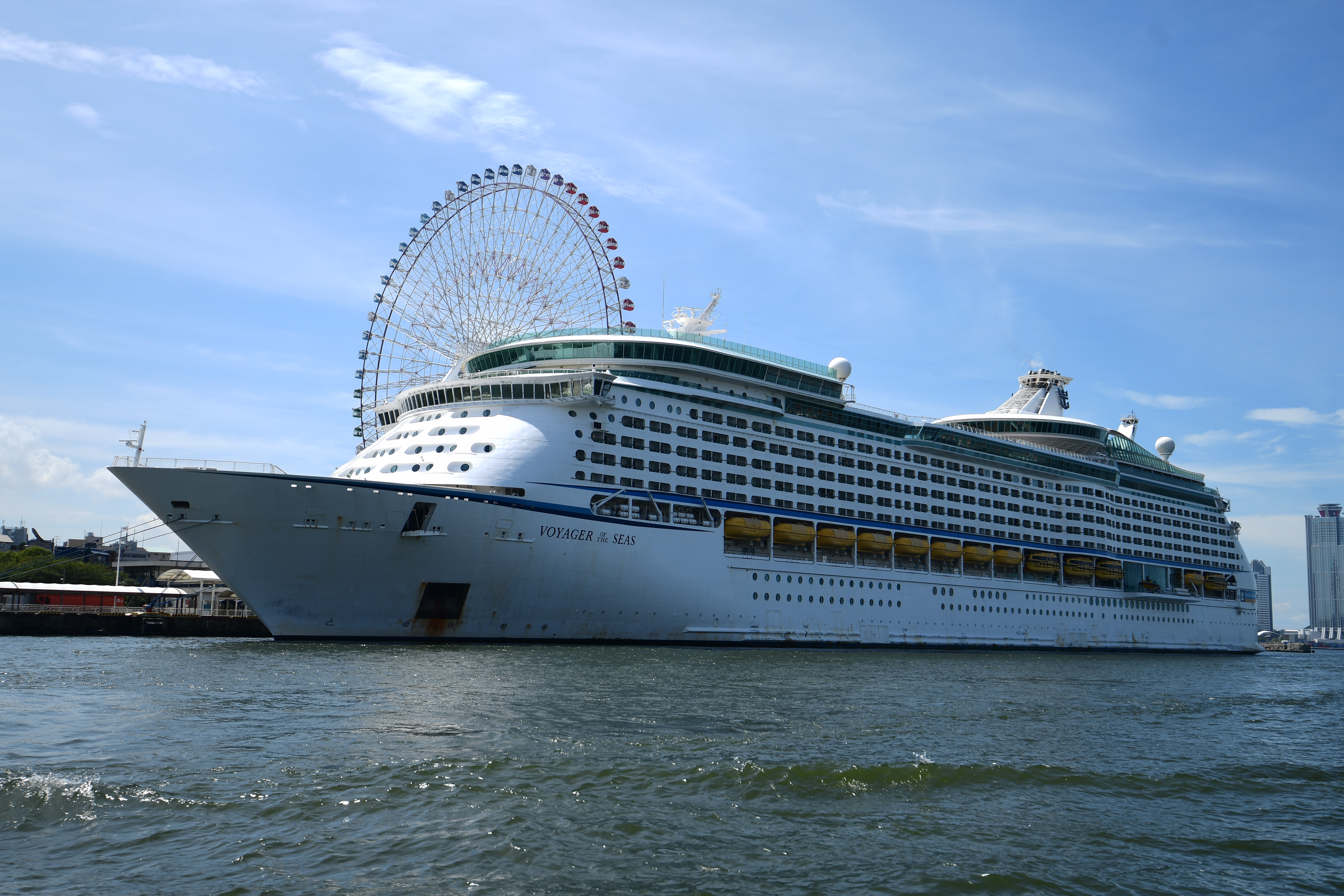 大阪天保山に停泊中のボイジャー・オブ・ザ・シーズ Nikon D7500